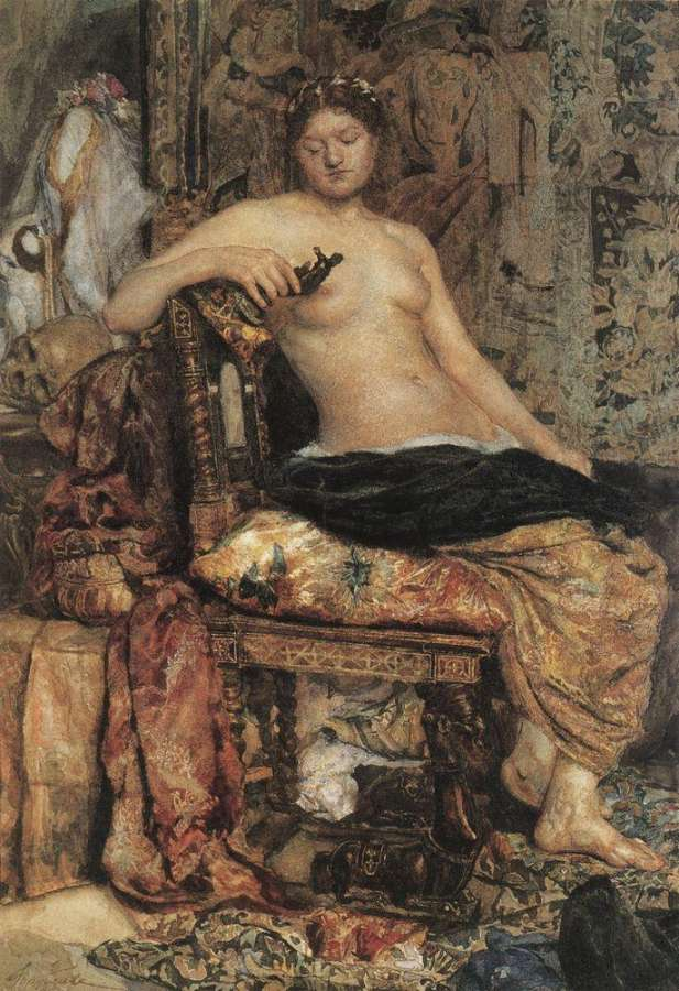 Натурщица в обстановке Ренессанса - первая самостоятельная картина Врубеля